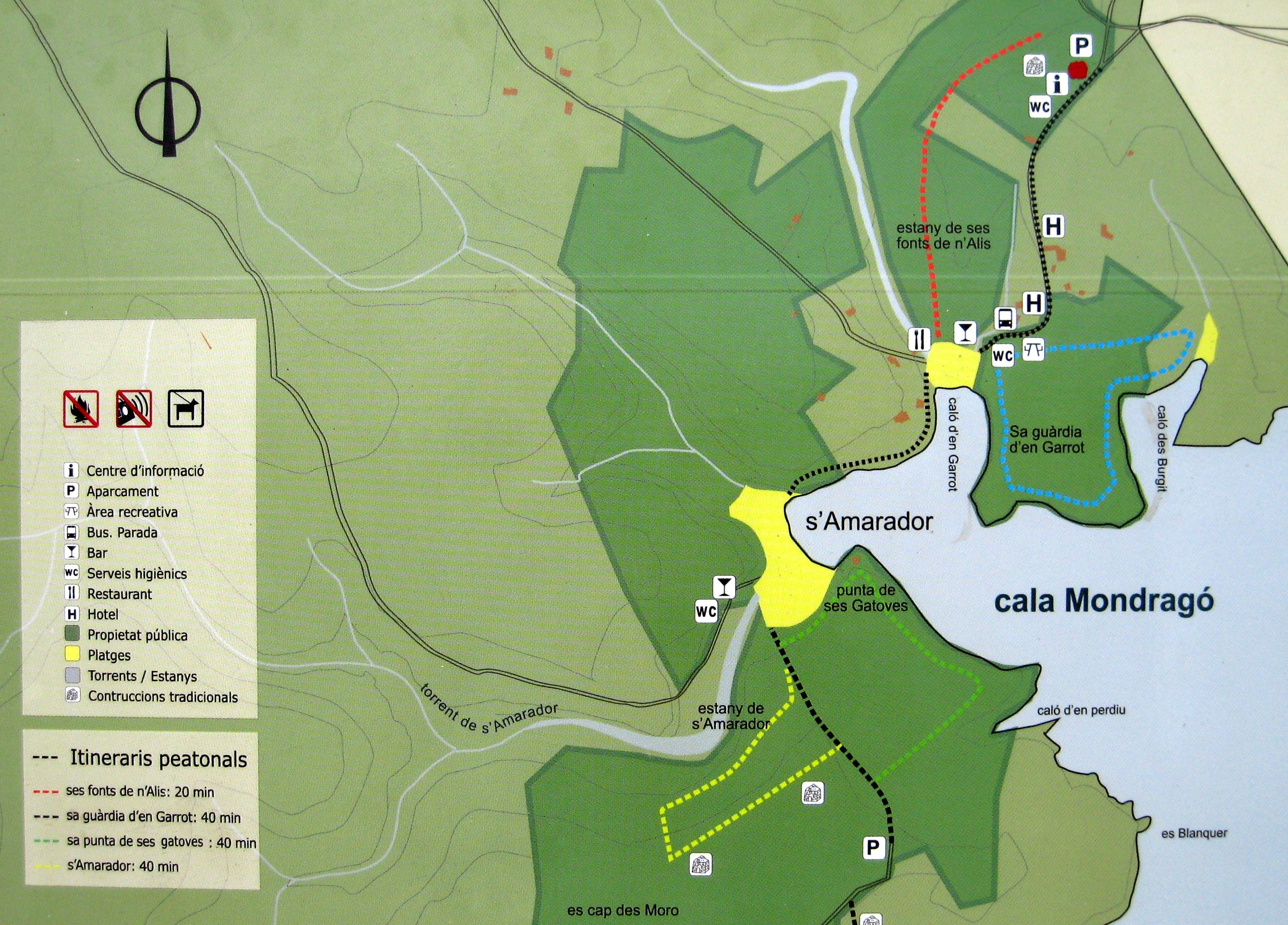 Ausschnitt der Hinweistafel neben dem Informationszentrum des Parc natural de Mondragó oberhalb von ses Fonts de n’Alís, Gemeinde Santanyí, Mallorca, Spanien